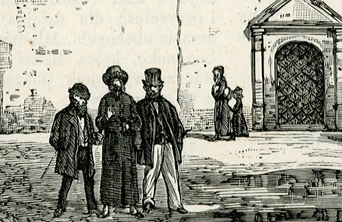 Synagoga w Łucku. Fragment